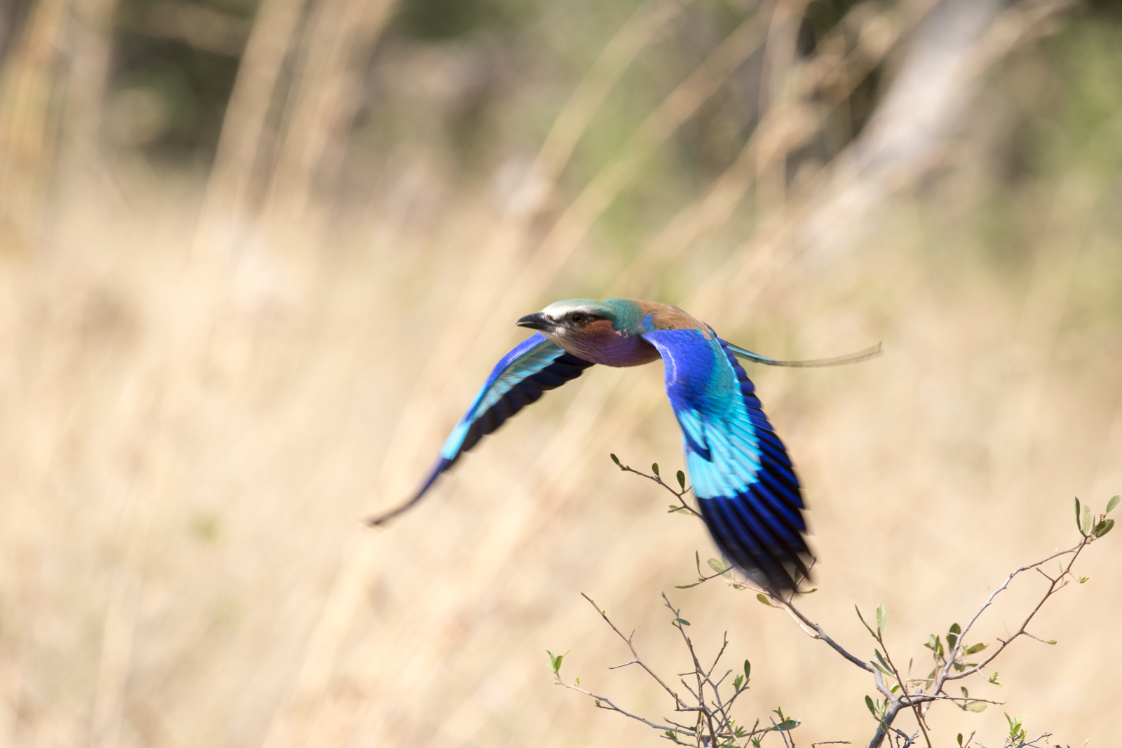 Gabelracke im Flug. Deutlich erkennbar sind die leuchtend blauen Flügel. Aufgenommen in Botswana, Okavangodelta 2017